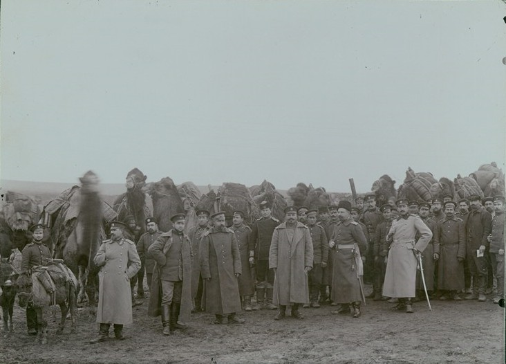 Български офицери и войници от Седемнадесети пехотен доростолски полк на Чаталджанските позиции.